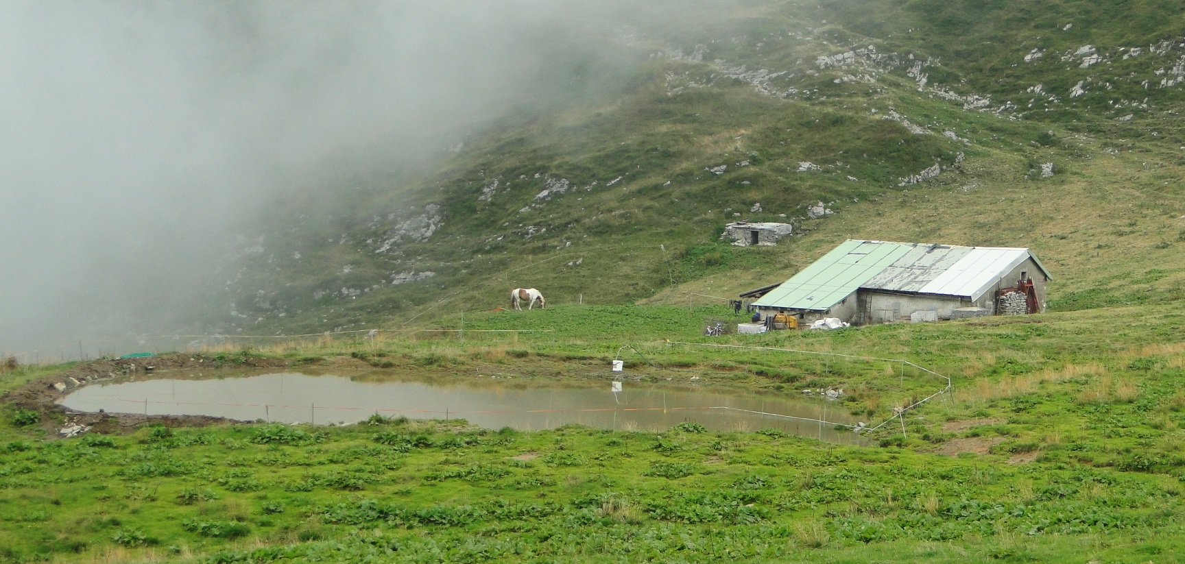 Baita Camplano. Prealpi bergamasche. Premolo (BG)